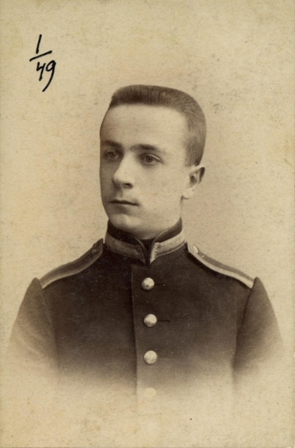 Владимир Зенонович Май-Маевский кадетом.